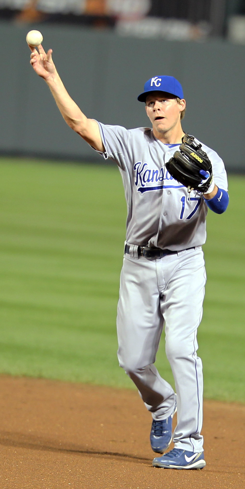 Chris Getz